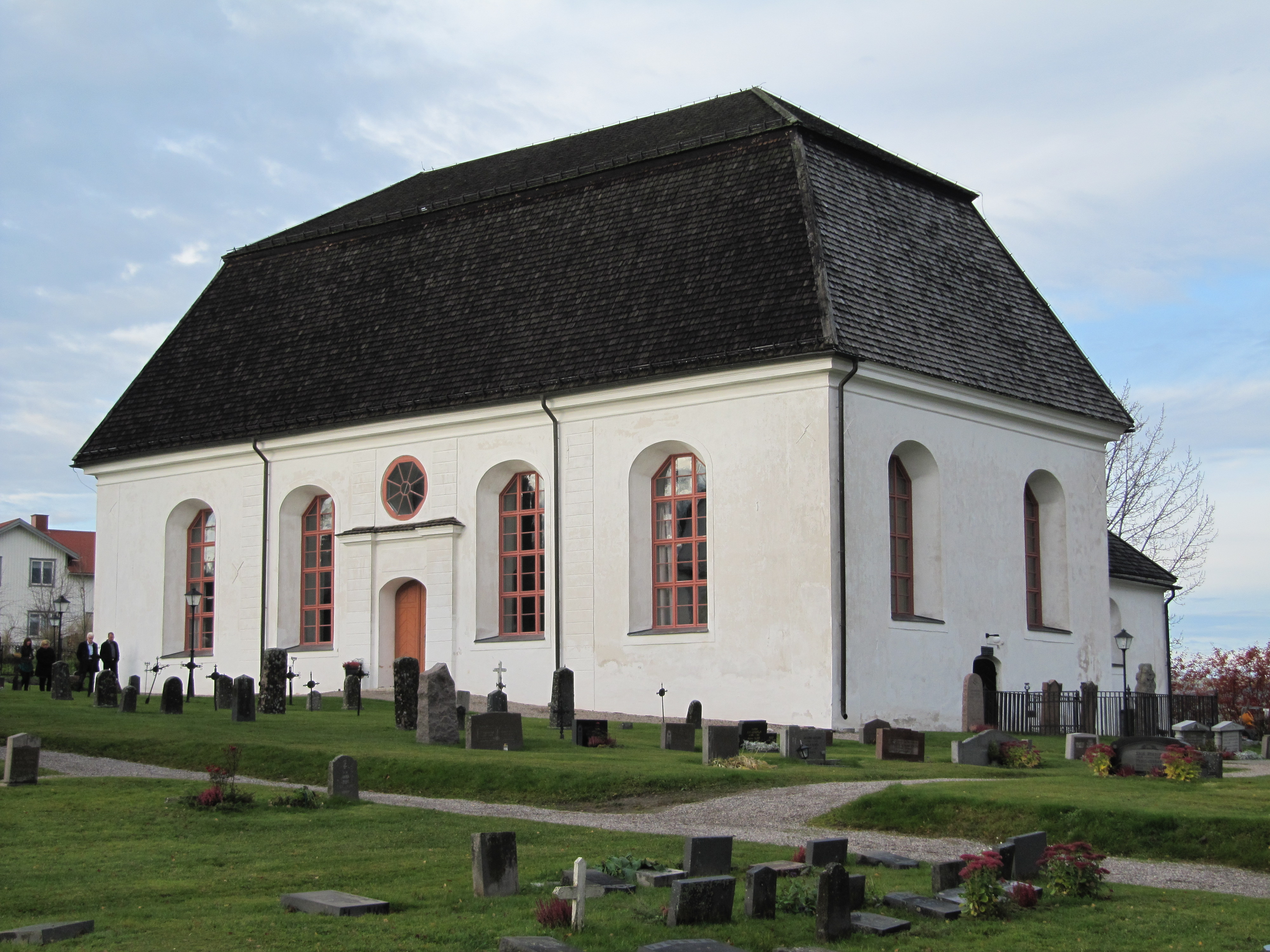 Attmars kyrka